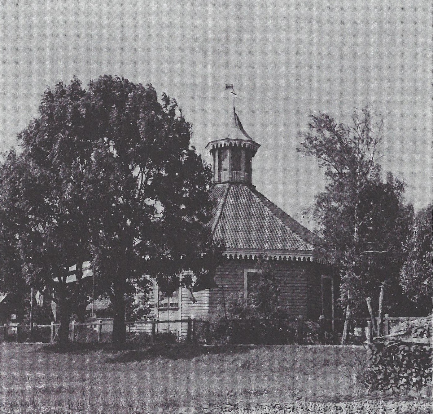 Kirche in Inse, Ostpreußen